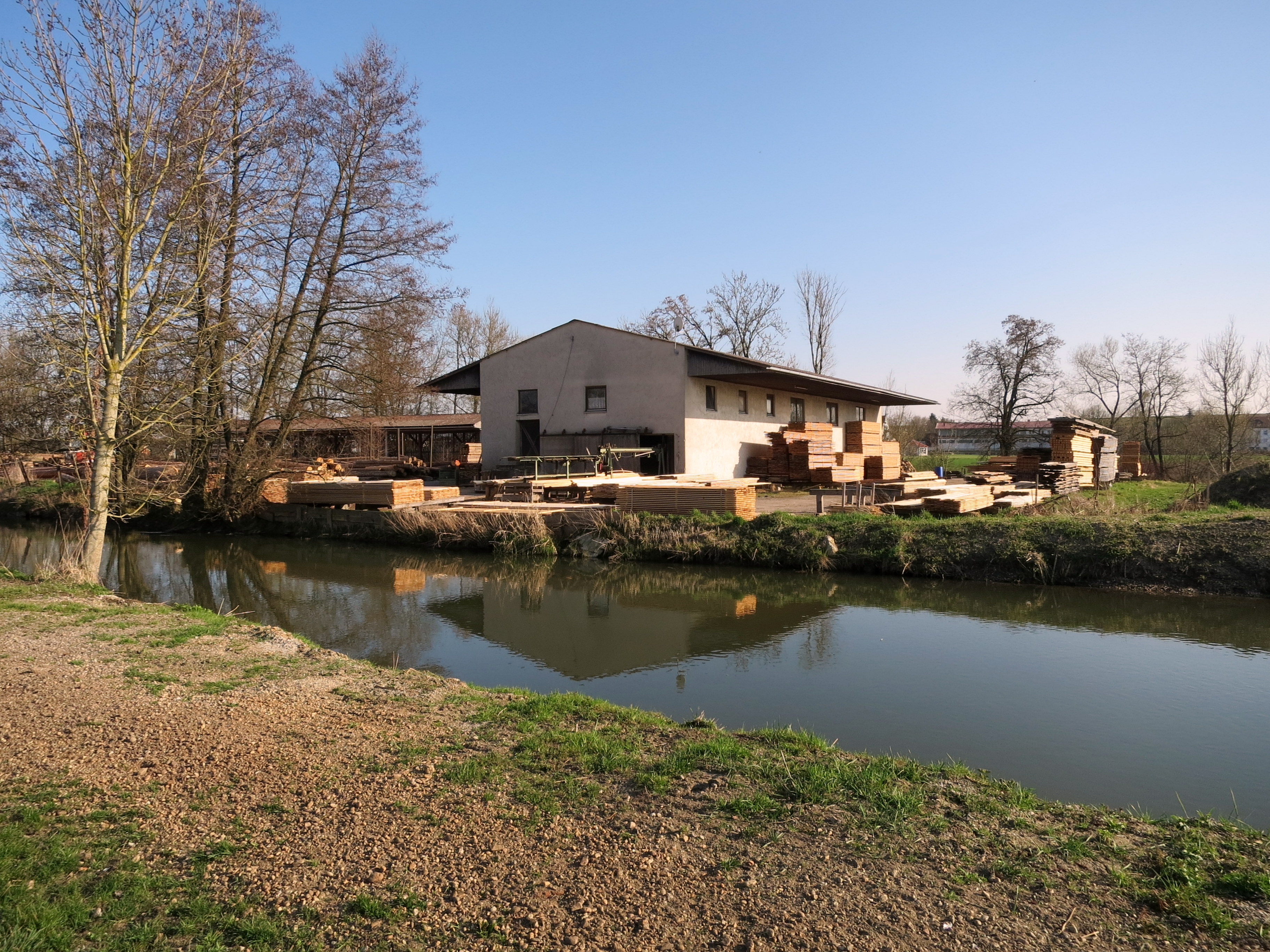 Das neue Sägewerk